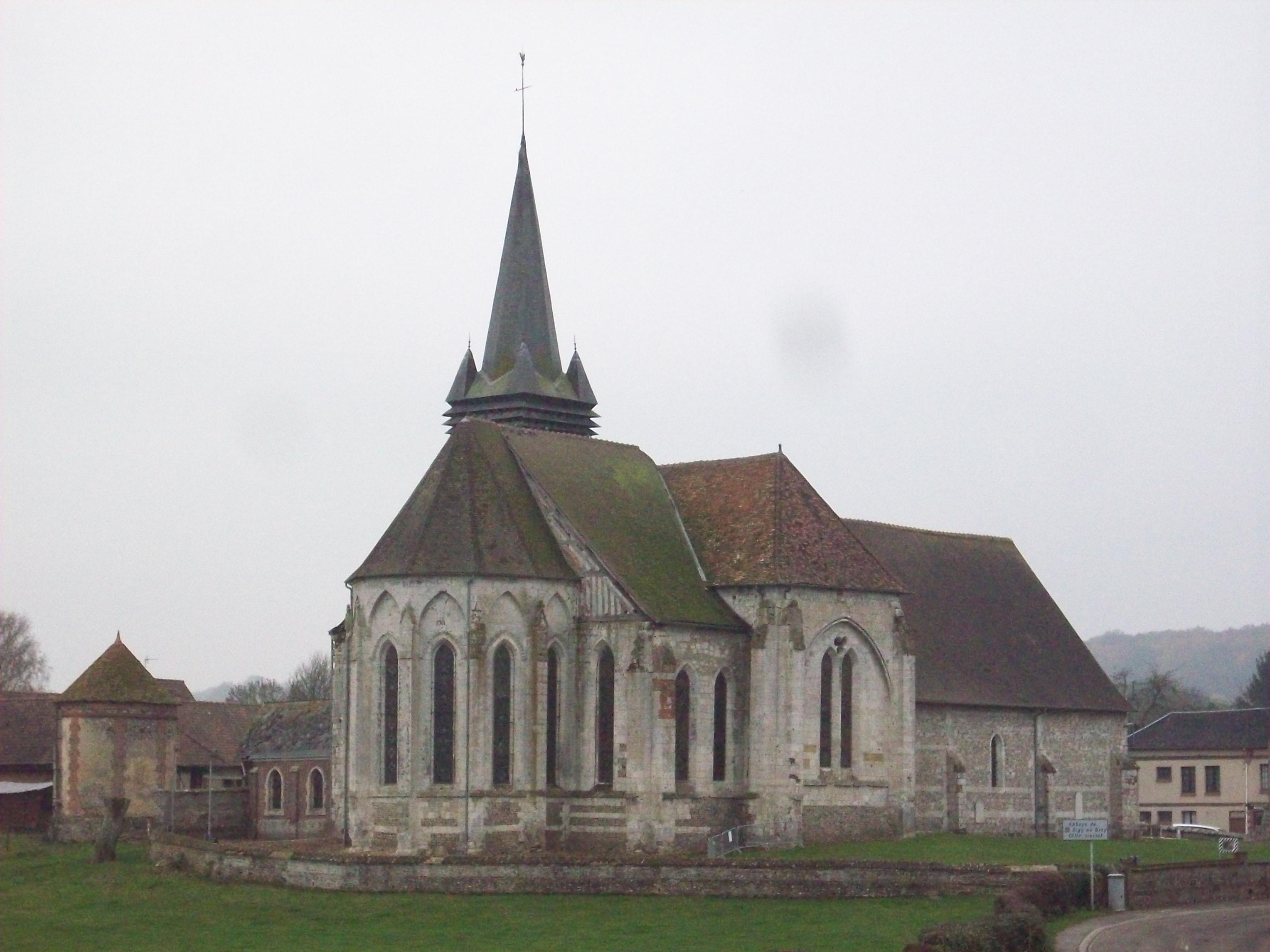 Eglise Saint-Martin de Sigy-en-Bray, ancienne abbatiale de l'abbaye Saint-Martin et Saint-Vulgain.